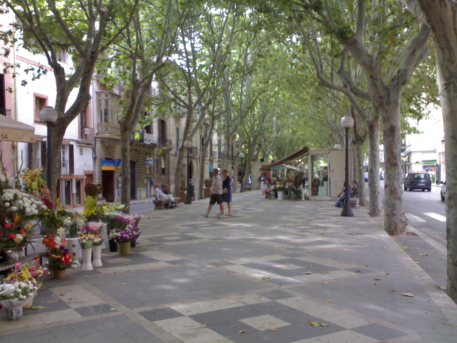 Las Ramblas en Palma.